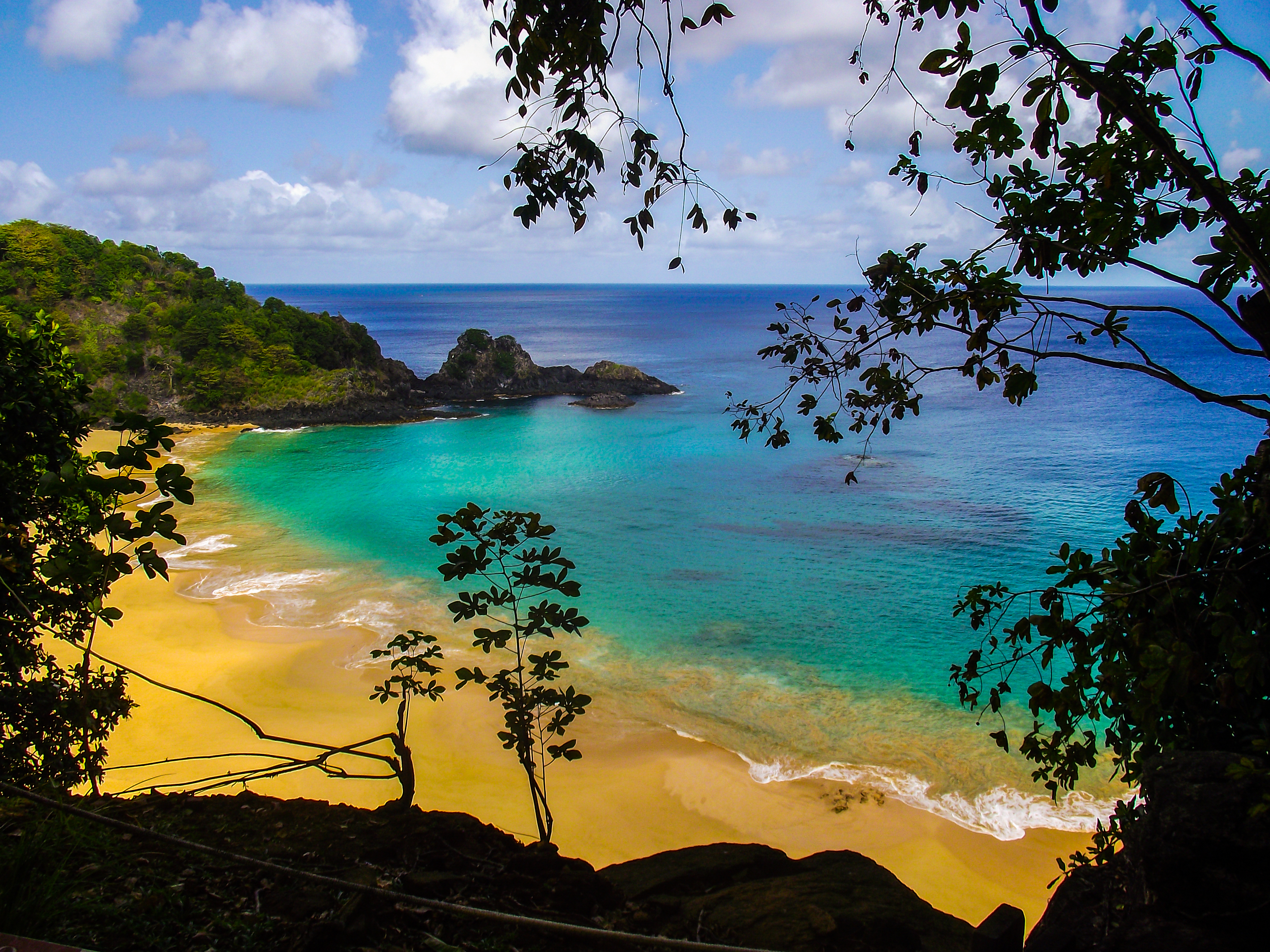 Praia do Sanho, na Baía do Sancho, em Fernando de Noronha